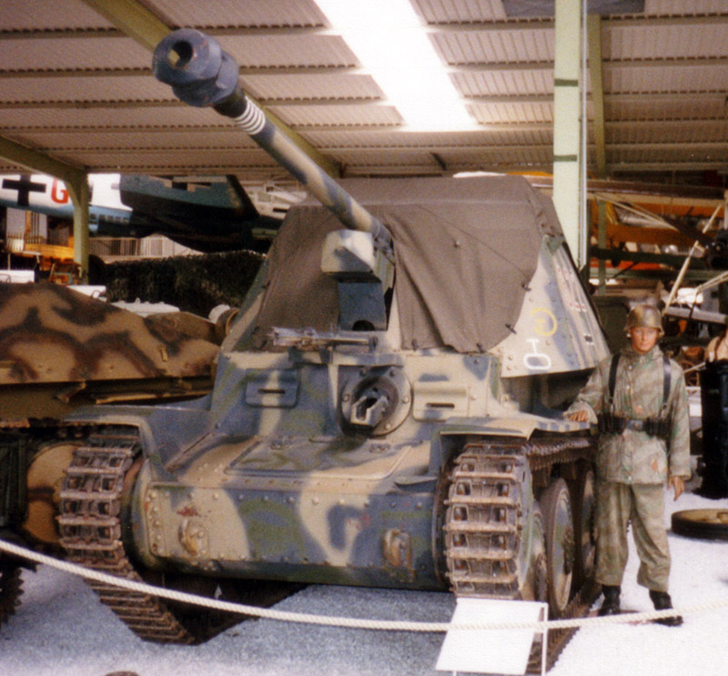 Beschreibung: Marder III Ausf.H (Sd.Kfz.138) auf Panzer 38(t) Fahrgestell